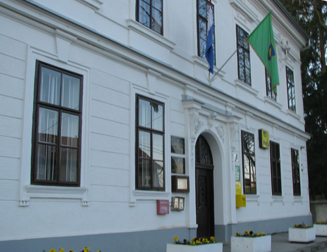 Zgrada Općine Veliko Trgovišće, Krapinsko-zagorska županija